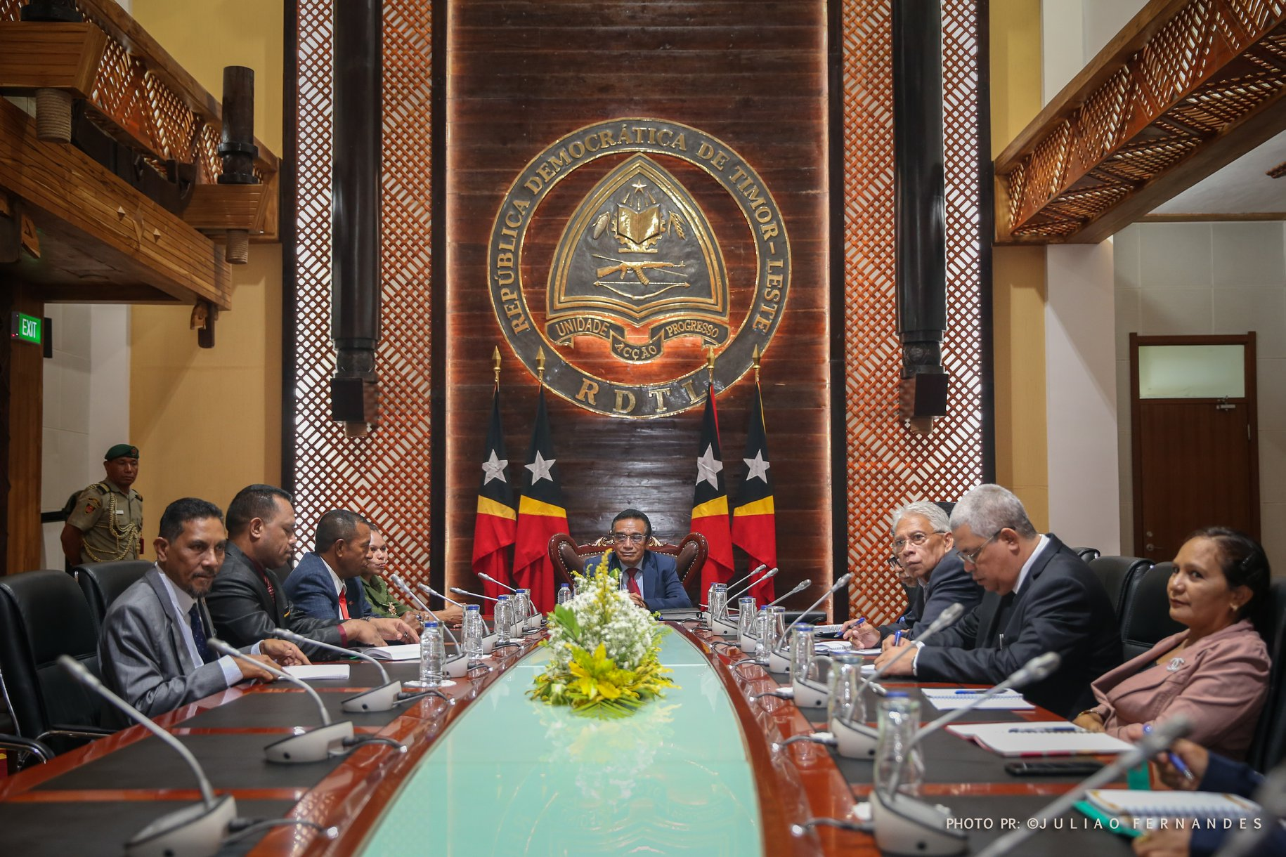 Vertreter der KHUNTO bei Staatspräsident Francisco Guterres im Palácio Presidente Nicolau Lobato